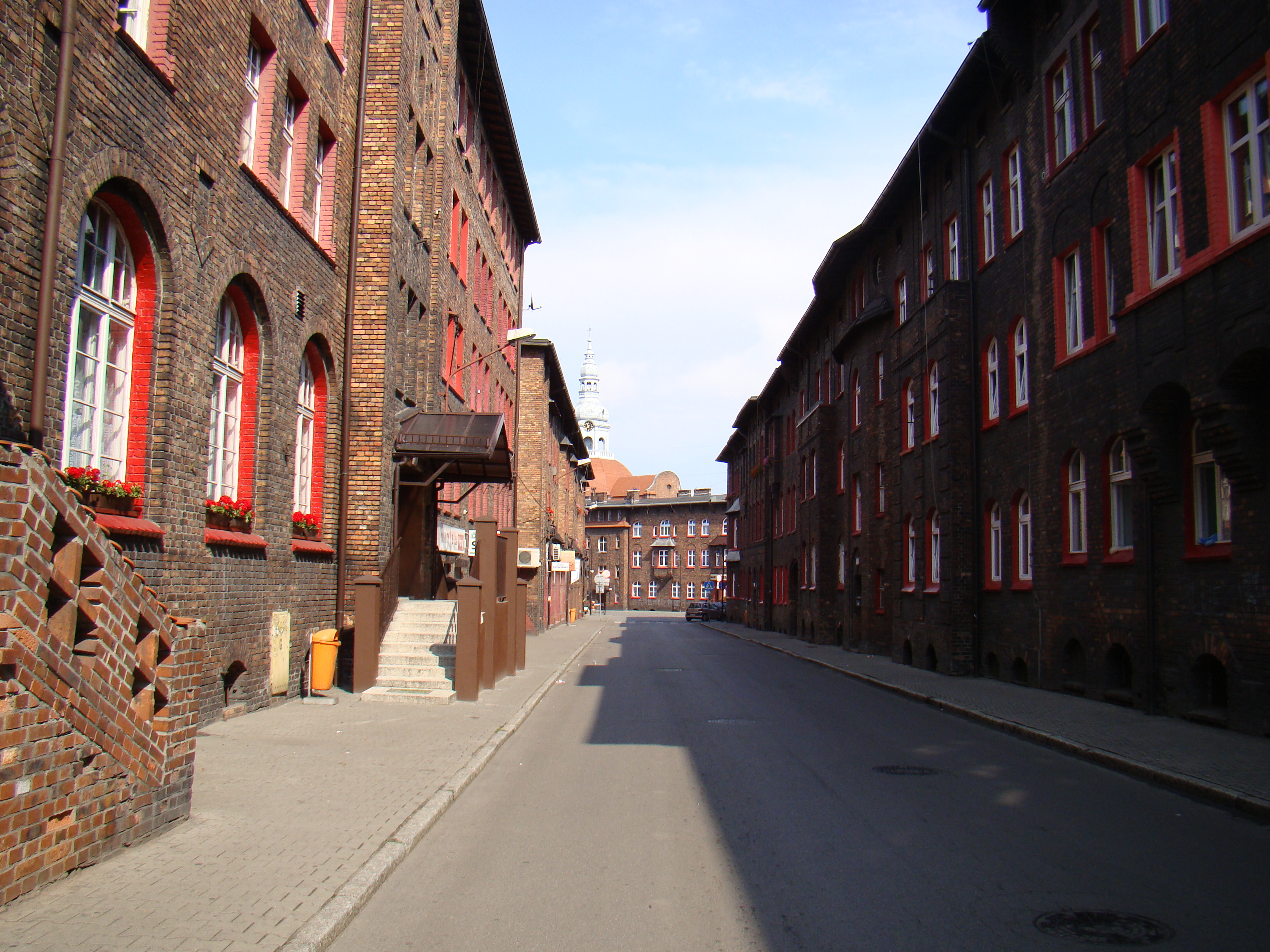 Katowice, układ urbanistyczno-przestrzenny osiedla robotniczego Nikiszowiec, 1908-1918